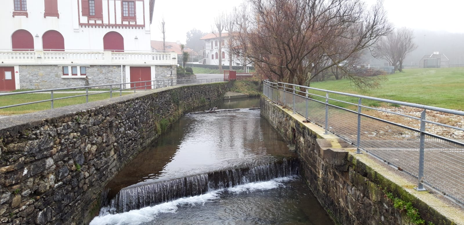 Mentaberri errekaren bokaletik hurbil, Haizabia, Urruña, Lapurdi